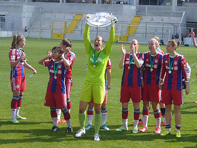 Tinja-Riikka Korpela mit der Schale